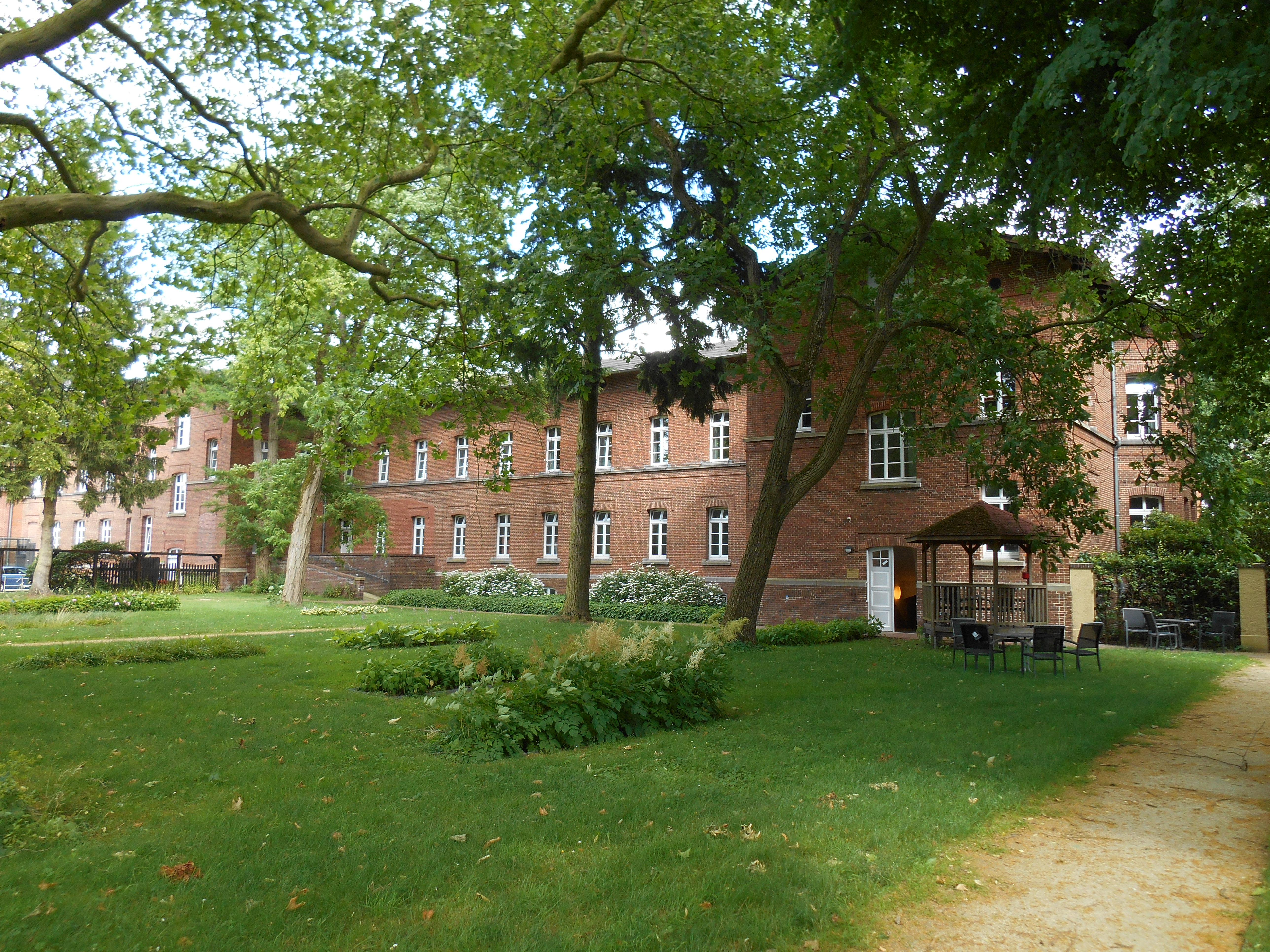 Бад Цвишенан, Психиатрическая клиника 2